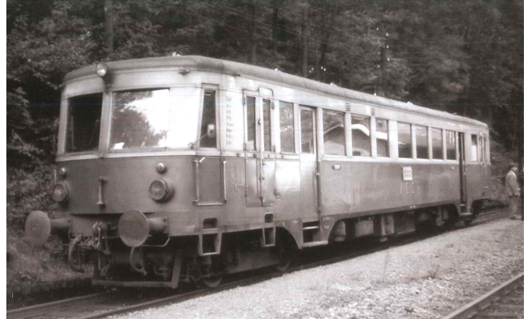 historische Aufnahme von dem VEE T101